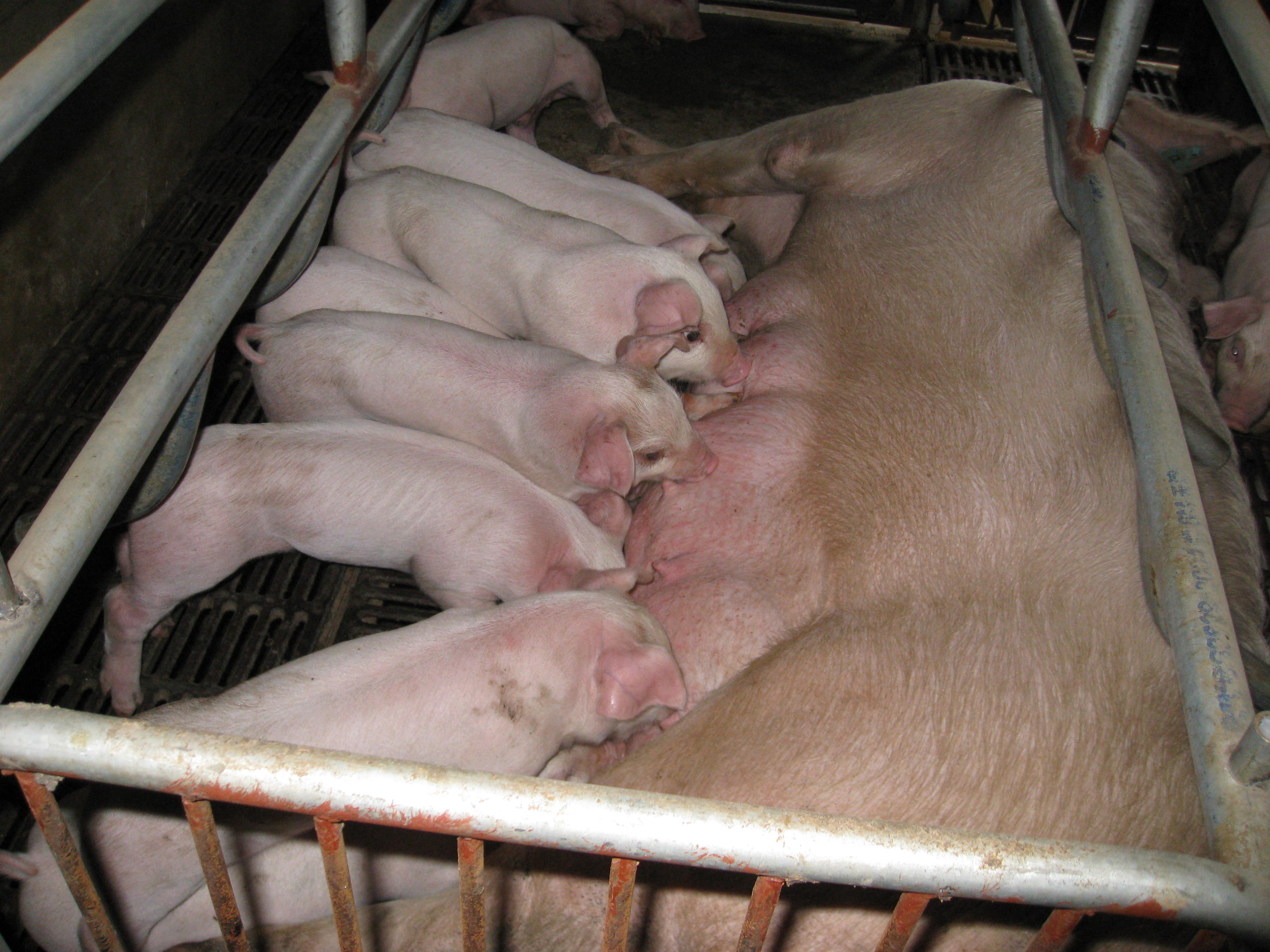 几头小猪正在吃奶